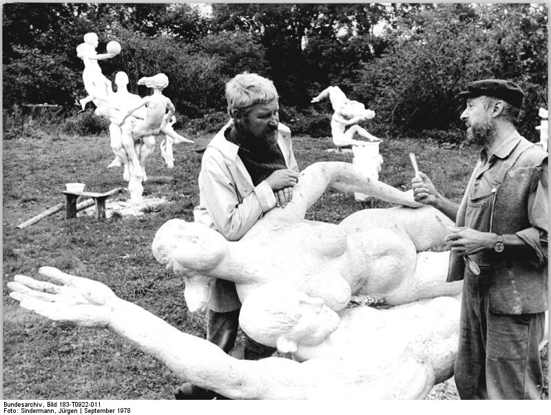 ADN-ZB-Sindermann-22.9.1978-Rostock: Atelier und Bühne. Kurz vor der Vollendung steht der "Brunnen der Lebensfreude", den die Rostocker Bildhauer Jo Jastram (l.) und Reinhard Dietrich gemeinsam gestalten. Der Brunnen mit einem Durchmesser von 20 Metern ist für den Rostocker Universitätsplatz bestimmt. Um eine zentral plazierte Familienplastik gruppieren sich ein schwimmendes und ein akrobatisches Paar, sowie spielende Kinder. Diesen überlebensgroßen Figuren werden kleine Tierplastiken und bogenartige Wasserstrahlen zugeordnet. Die beiden Künstler sind seit 27 Jahren freundschaftlich verbunden."